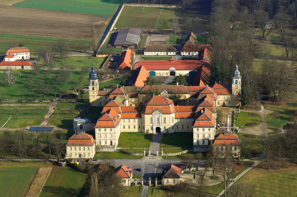 Schloss Fasanerie in Eichenzell. Meine eigene Luftaufnahme vom 18.10.2000. Die Aufnahme ist vollständig freigegeben.